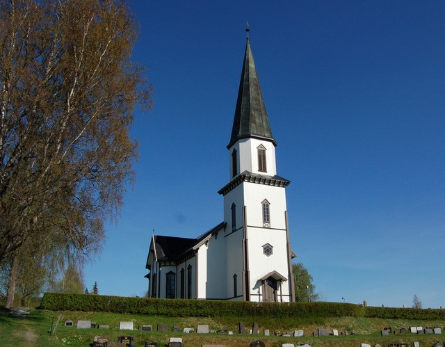 Sand kirke